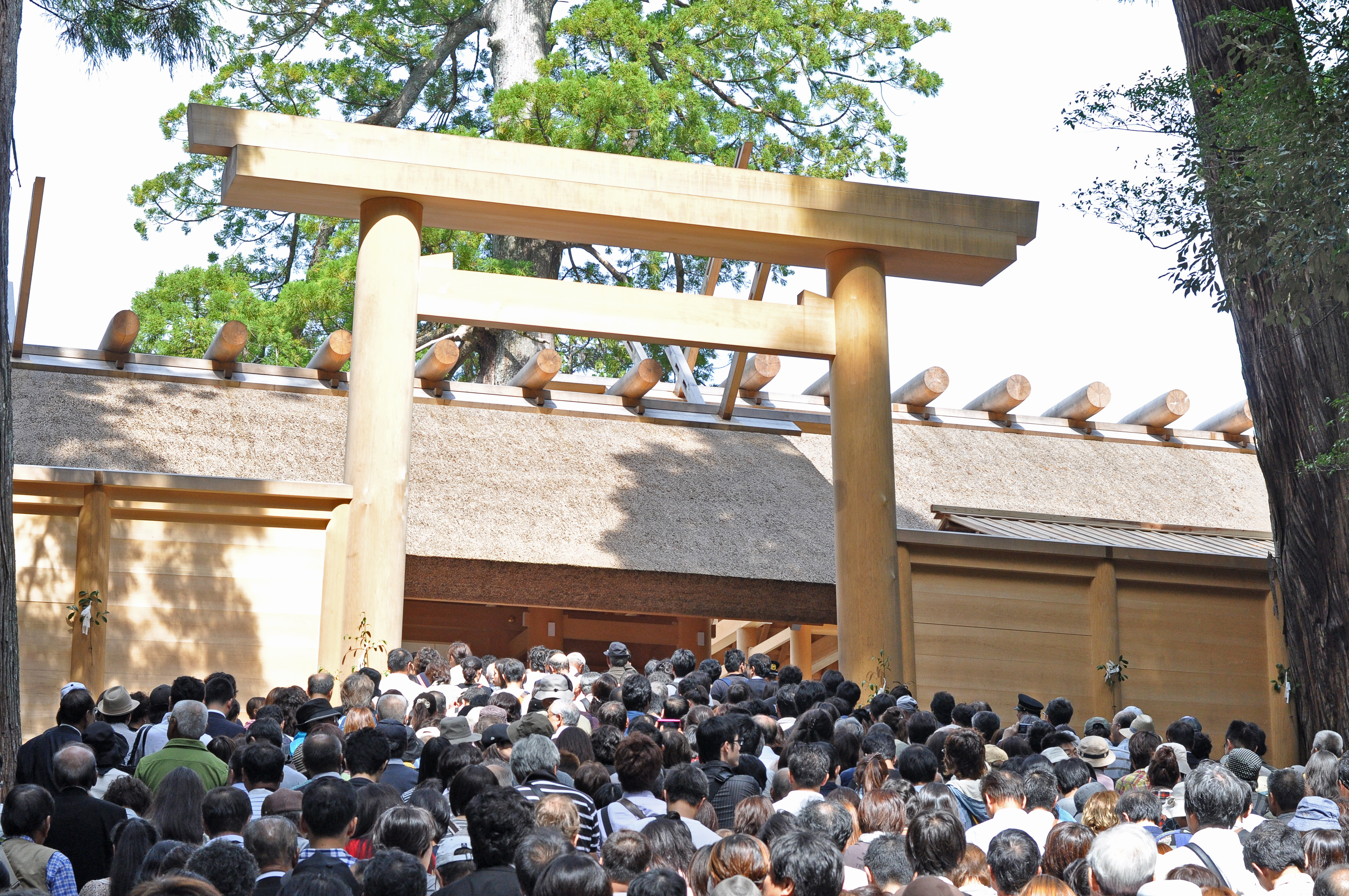 2013年、第62回式年遷宮の際の内宮正殿の様子